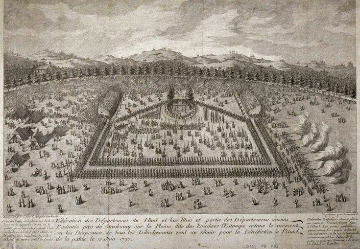 Fédération des Départemens du Haut et bas-Rhin et partie des Départemens voisins. Exécutée près de Strasbourg sur la Plaine dite des Bouchers . L'Estampe retrace le moment ou les Drapeaux de tous les détachements vont se réunir pour la Bénédiction à l'Autel de la patrie le 13 Juin 1790. Bibliothèque nationale et universitaire de Strasbourg